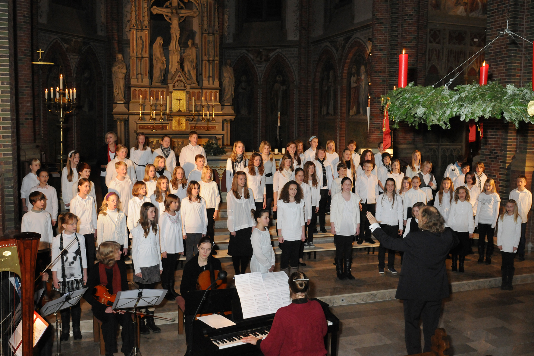 Konzert der Chorklassen im Dezember 2010 in der St. Antonius Kirche in Papenburg